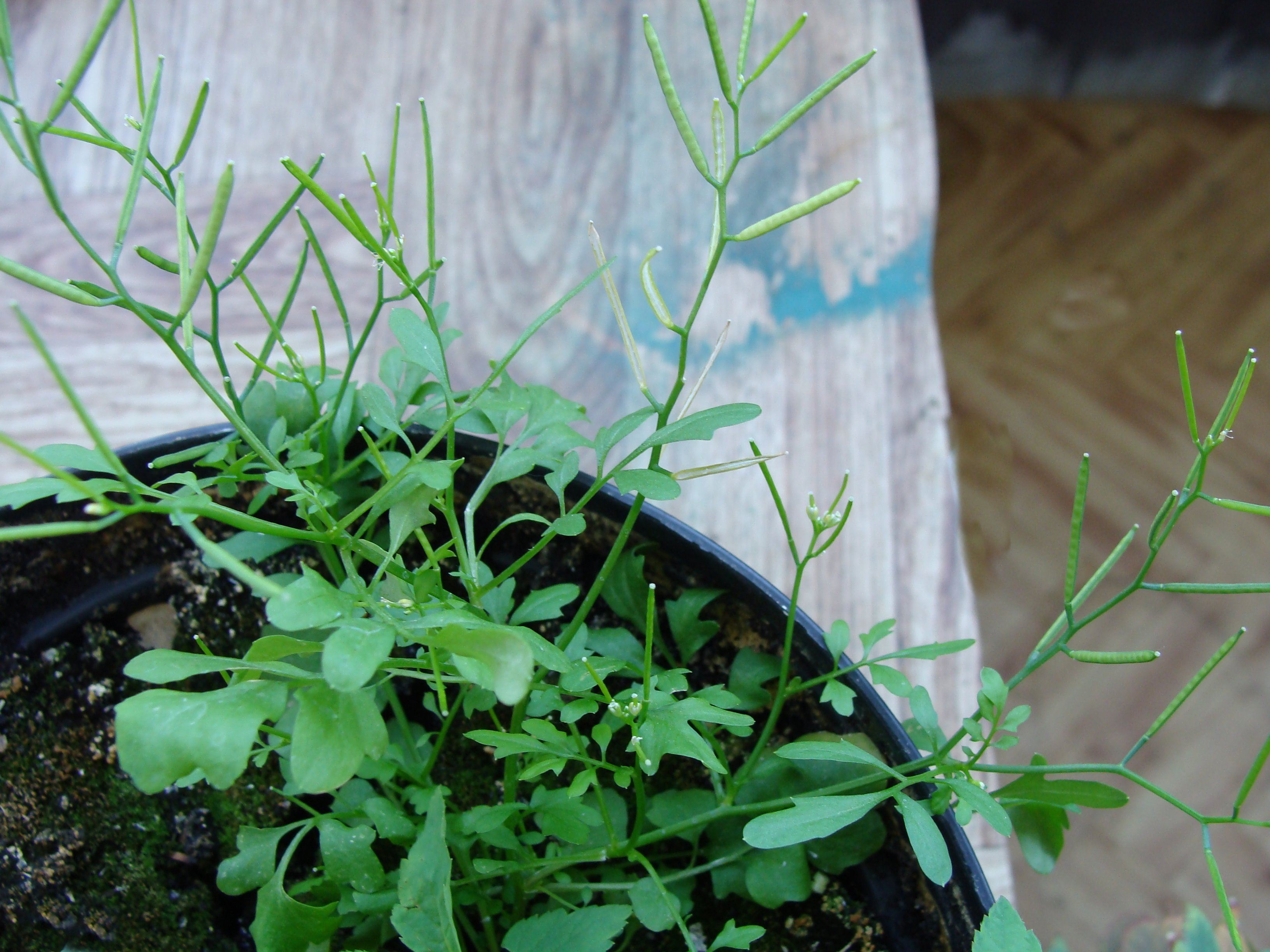 Rzeżucha włochata Cardamine hirsuta